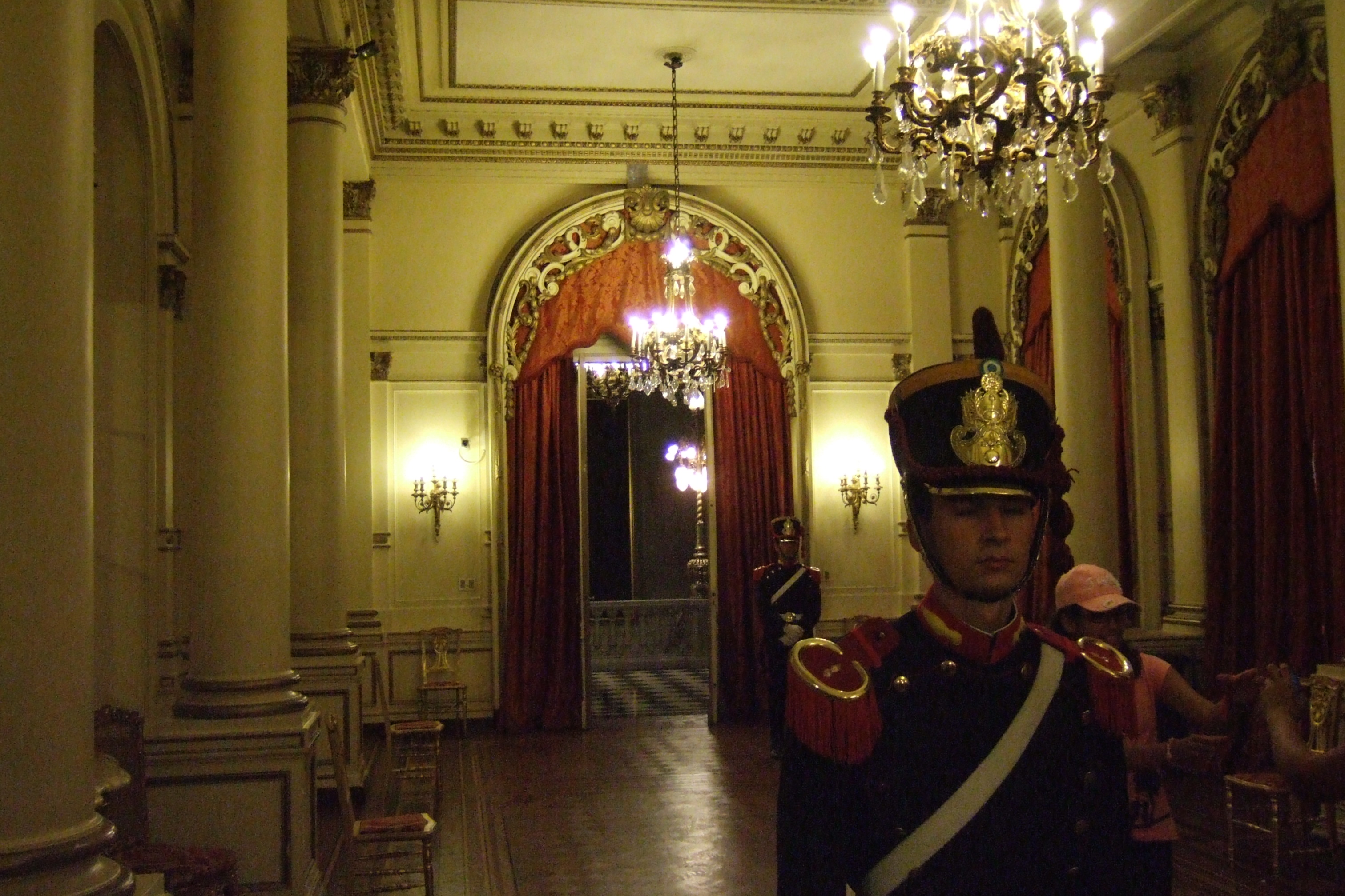 阿根廷总统府卫兵